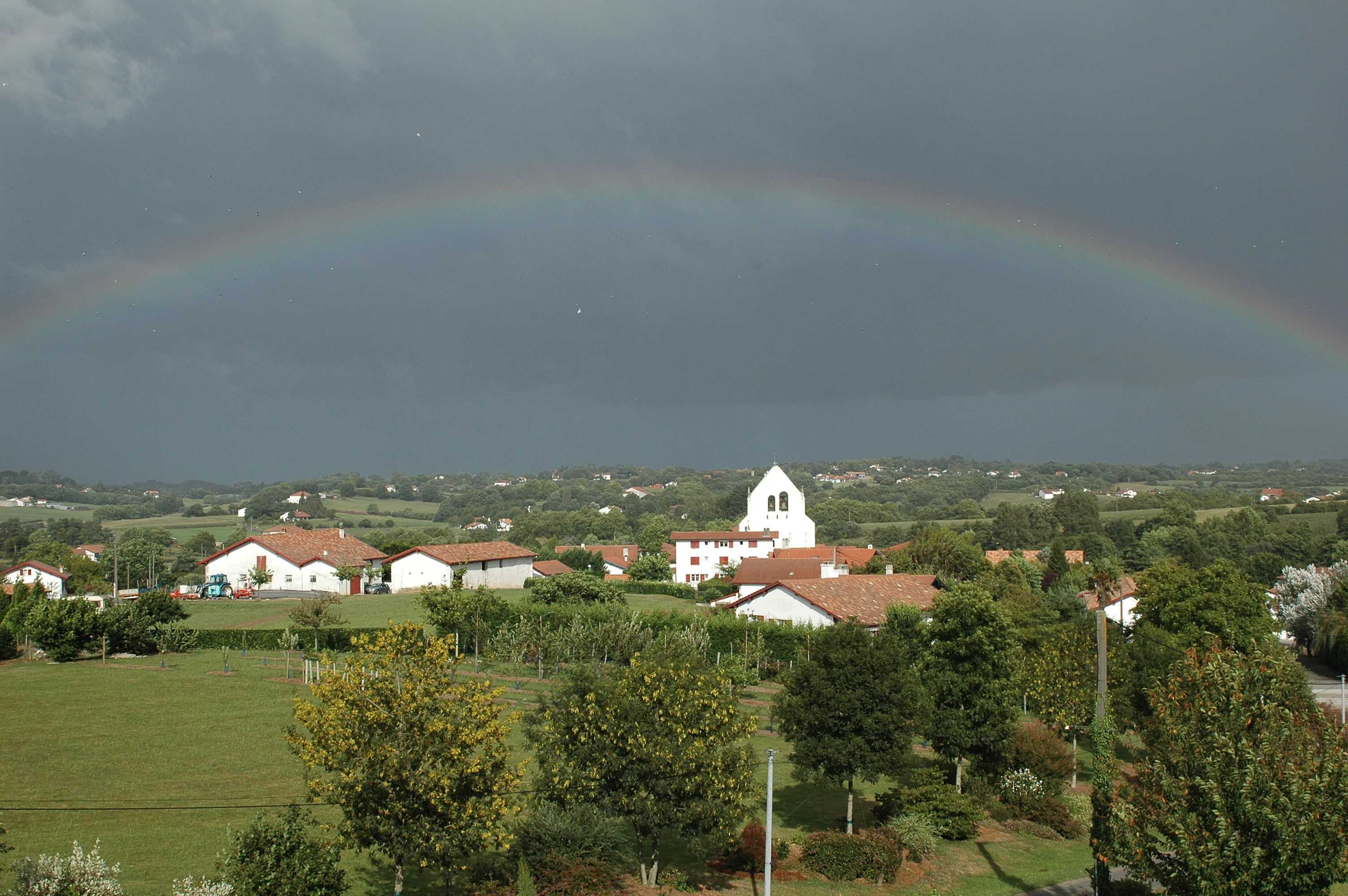 Ahetze, arc en ciel au-dessus de l'église. Photo prise le 17/08/06 par Harrieta171